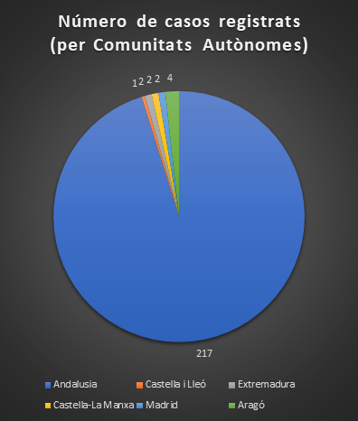 Número de casos diagnosticats per a les comunitats autònomes majoritàriament afectades. Es veu que a Andalusia es van donar més casos.